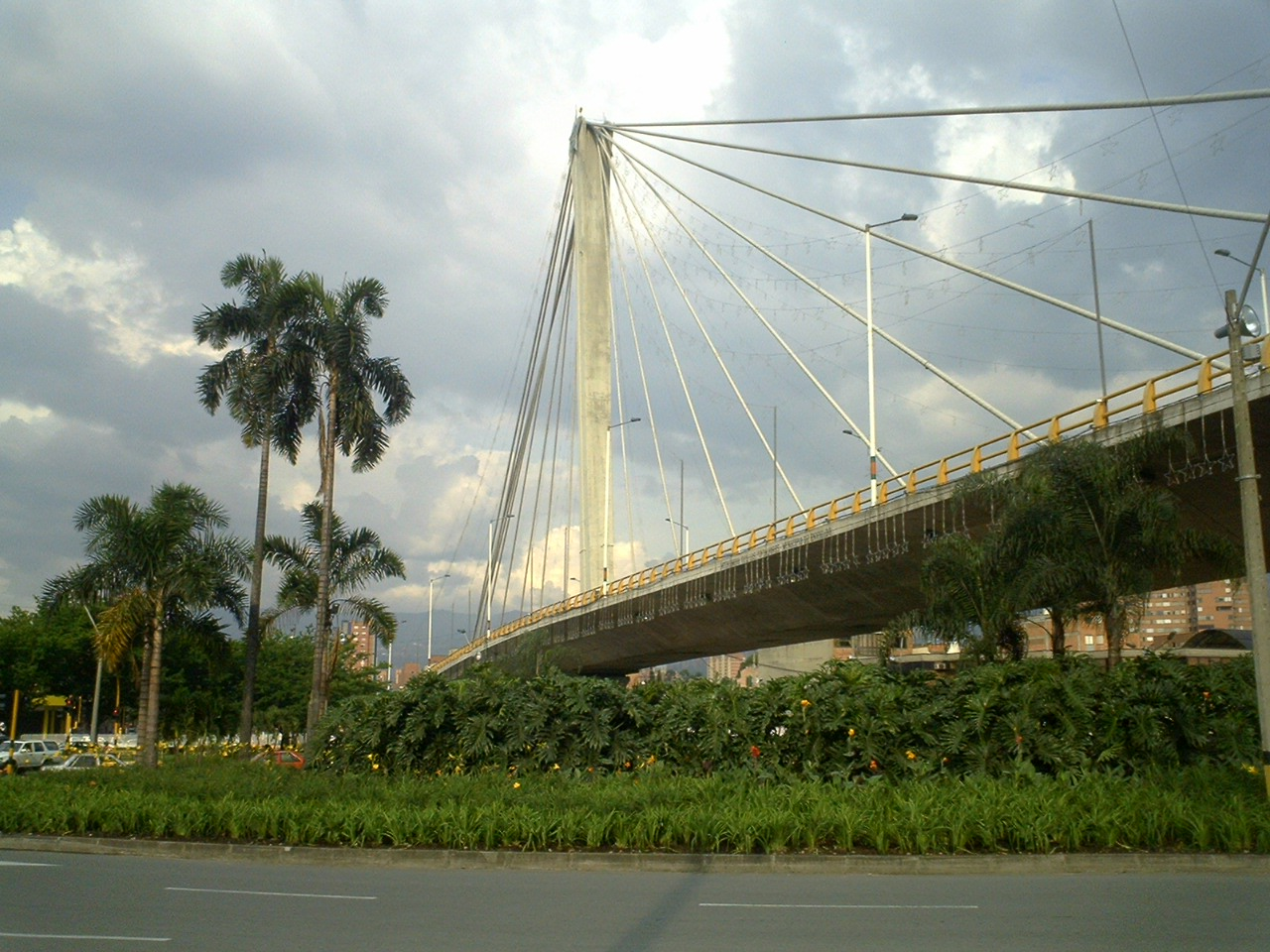 viaducto de Envigado, Colombia.